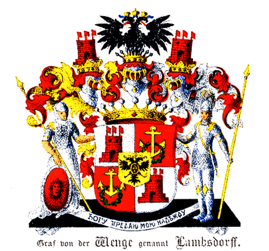 Russian noble COA Lambsdorf